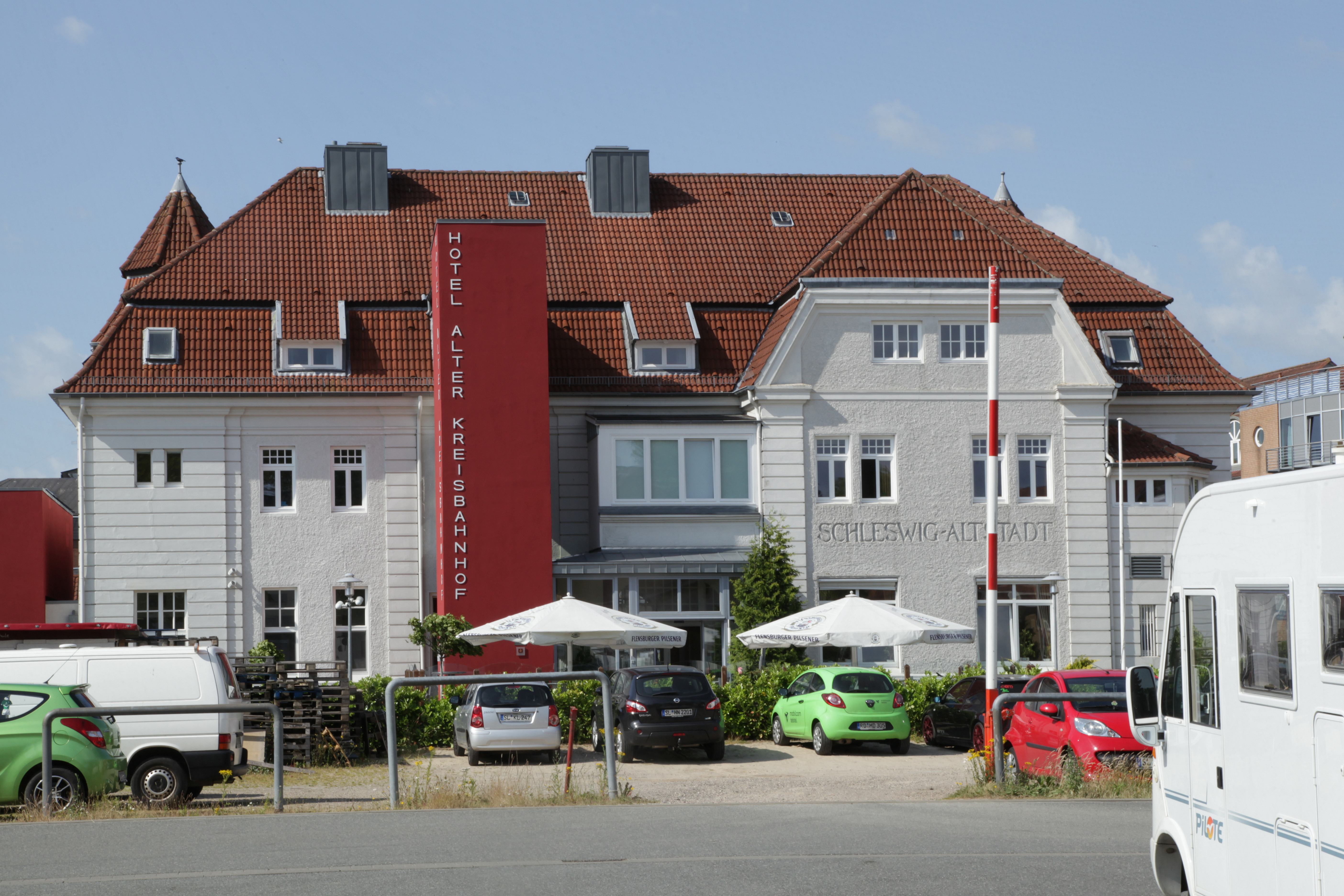 Hotel Alter Kreisbahnhof, ehemaliger Kreisbahnhof, Königstraße 9 in Schleswig